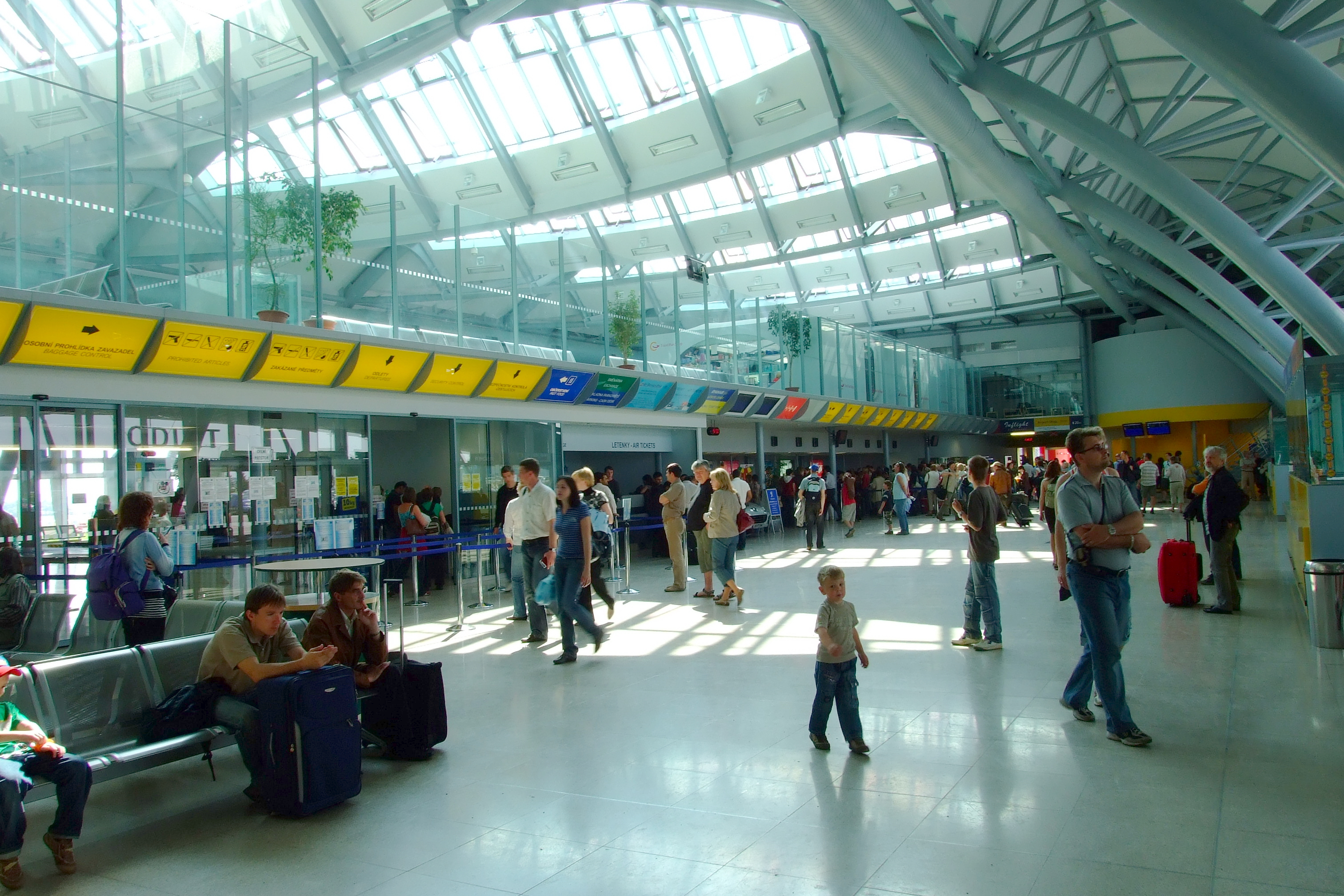 Interiér haly letiště Brno-Tuřany